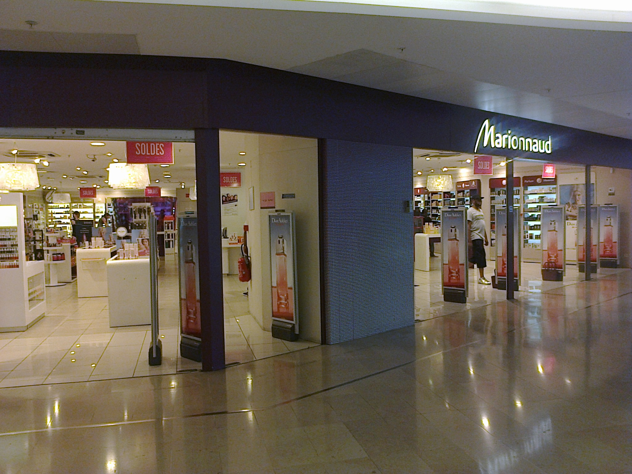 Magasin Marionnaud - Les Quatre Temps - La Défense